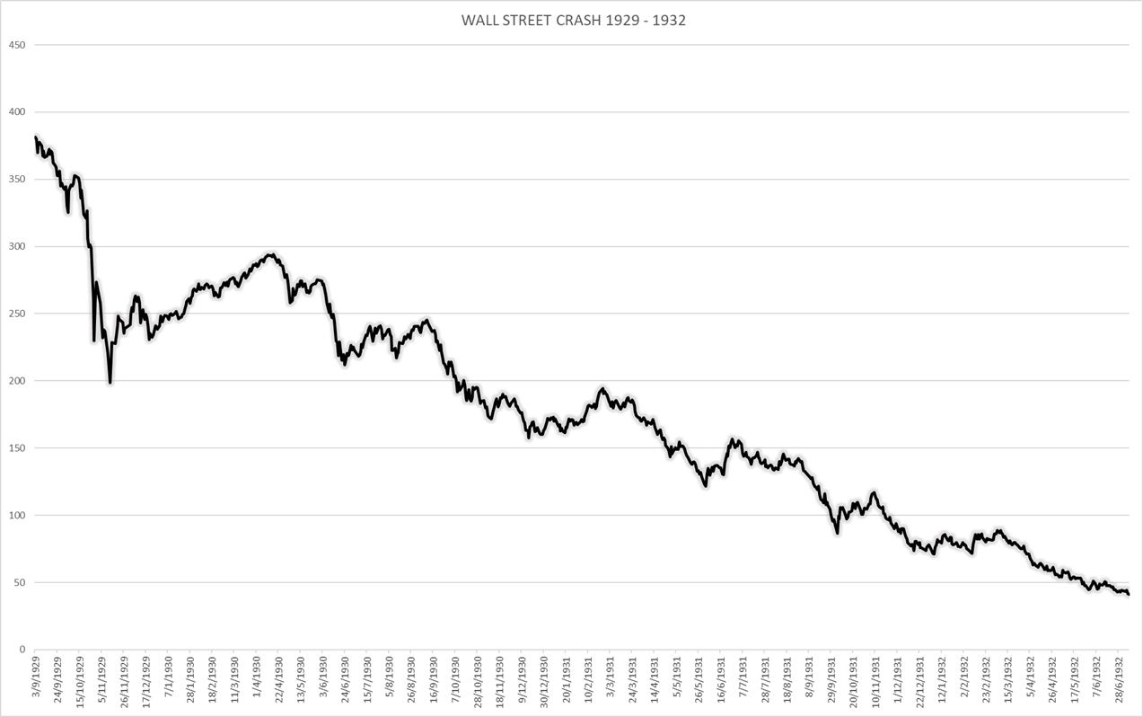 Graf ini menunjukan harga saham Wall Street menjunam dari tahun 1929 hingga tahun 1932 dan merupakan salah satu akibat penyumbang kepada Kegawatan Teruk Amerika pada tahun 1930-an.